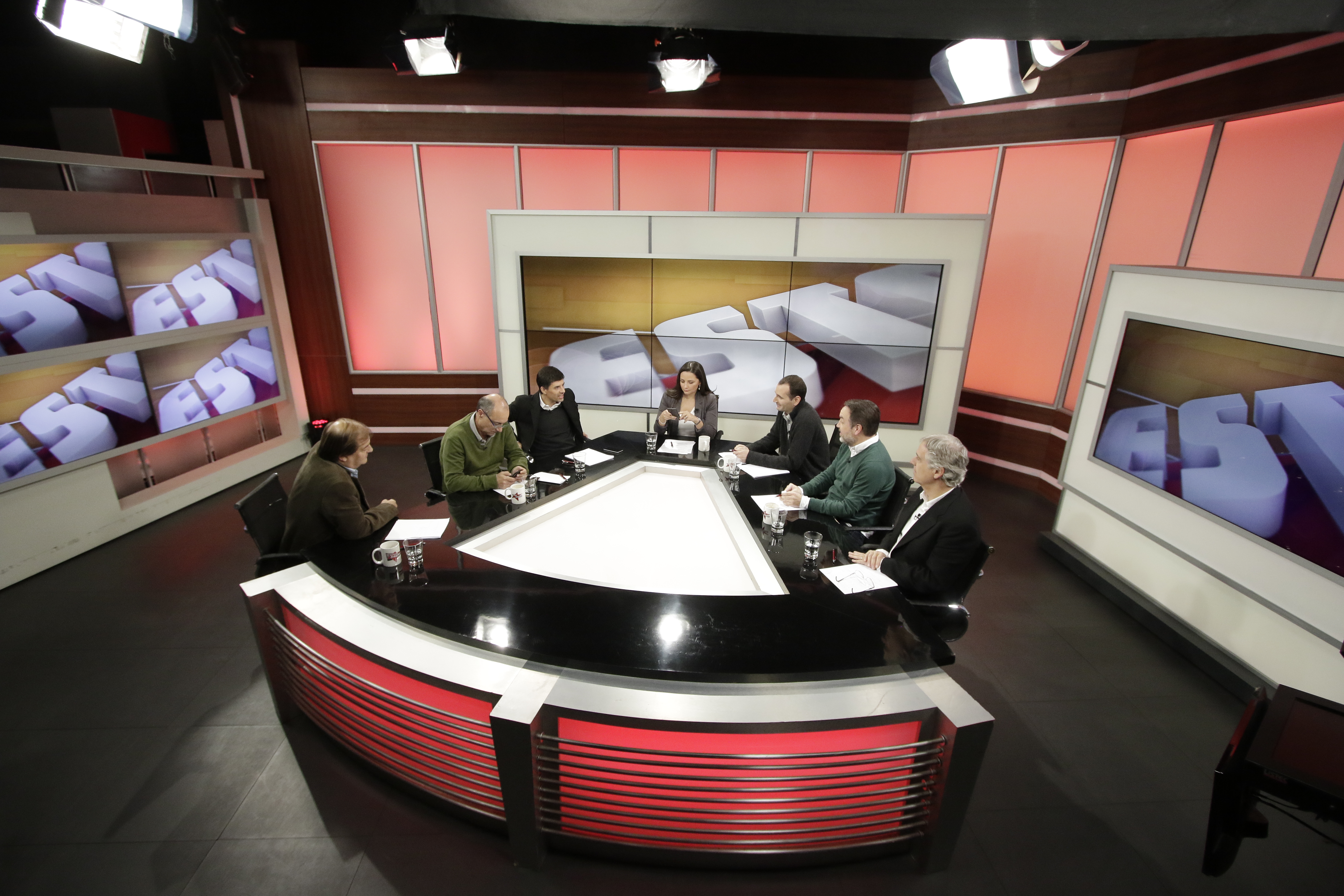 24 de abril 2016. Ministro Marcelo Díaz participa en programa de TVN Estado Nacional.